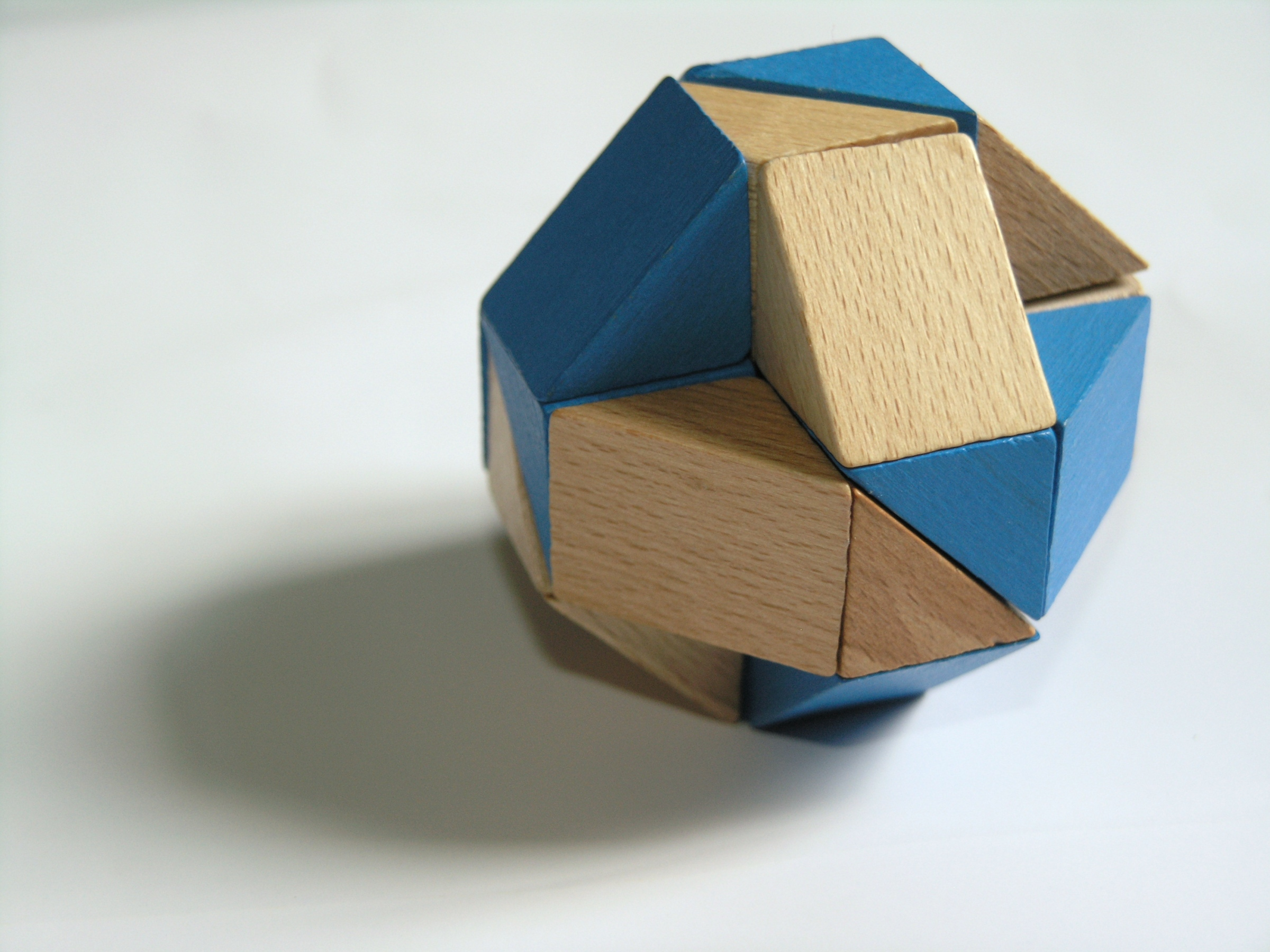 Rubik's Snake